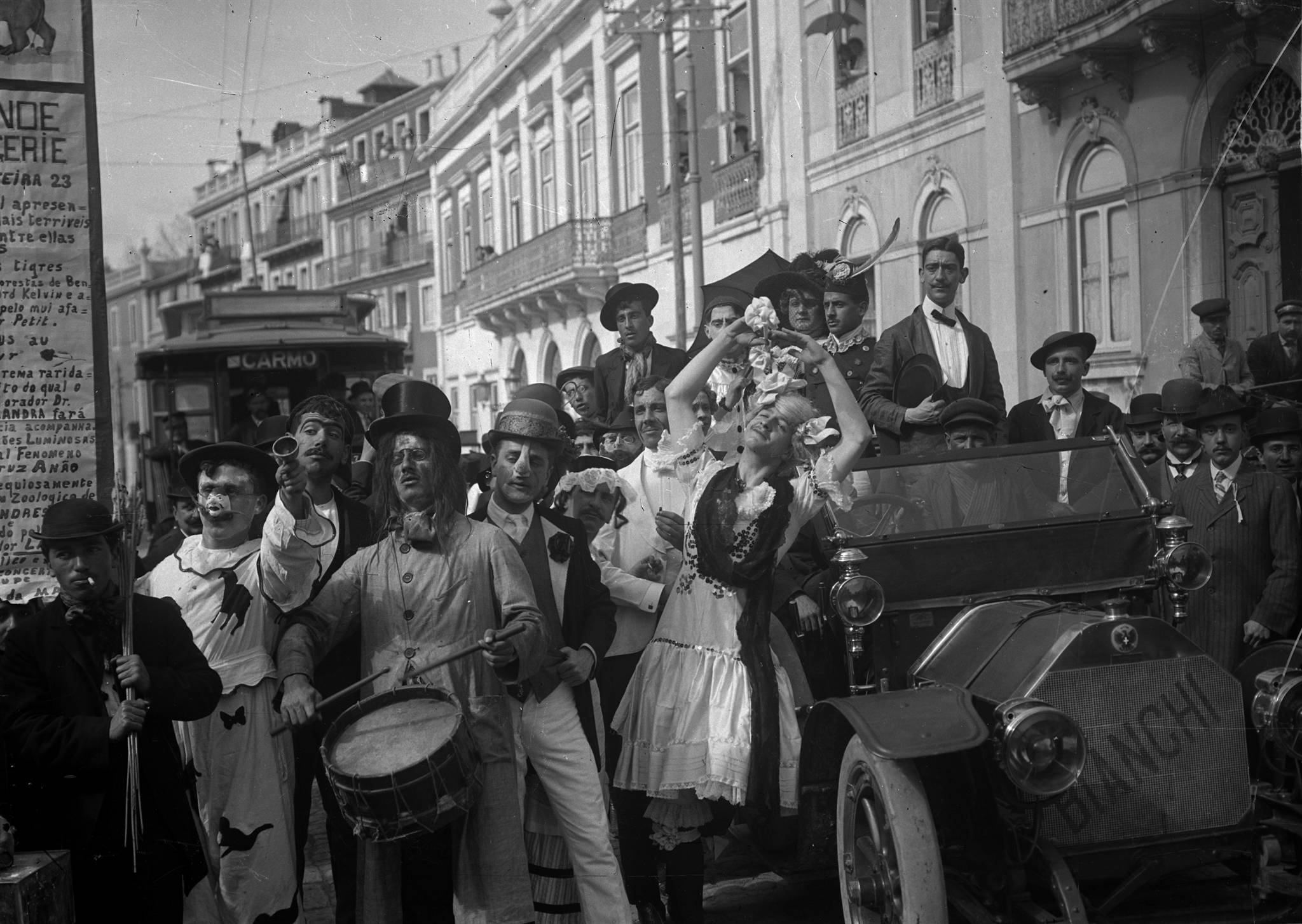 Carnaval em Lisboa. Negativo de gelatina e prata em vidro; 9×12 cm2